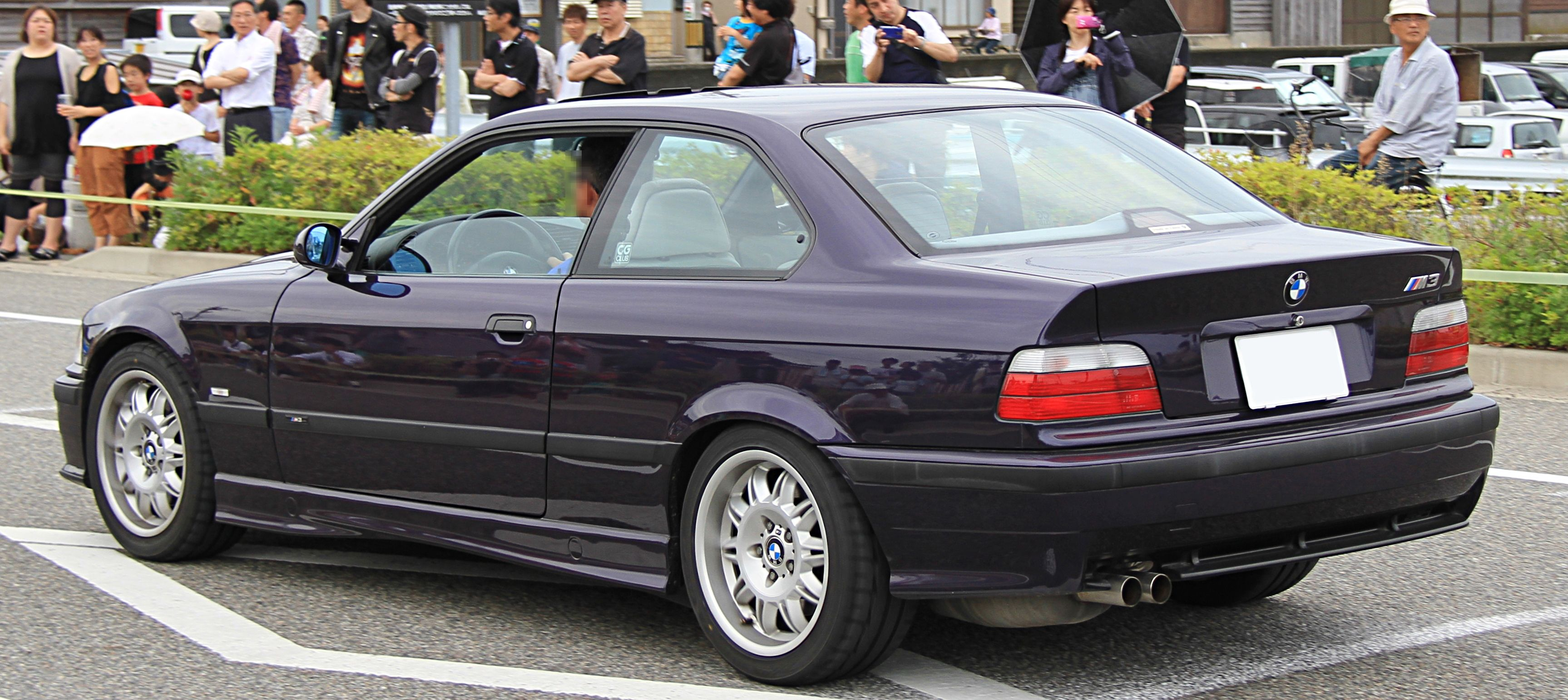 BMW E36